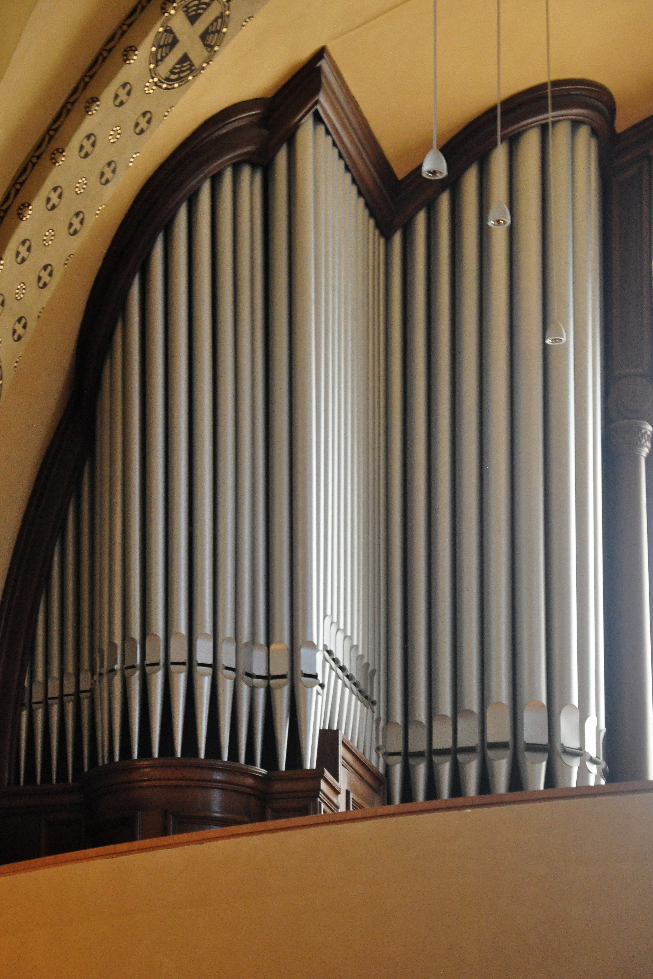 Katholische Kirche St. Antonius in Zürich-Hottingen (Switzerland)